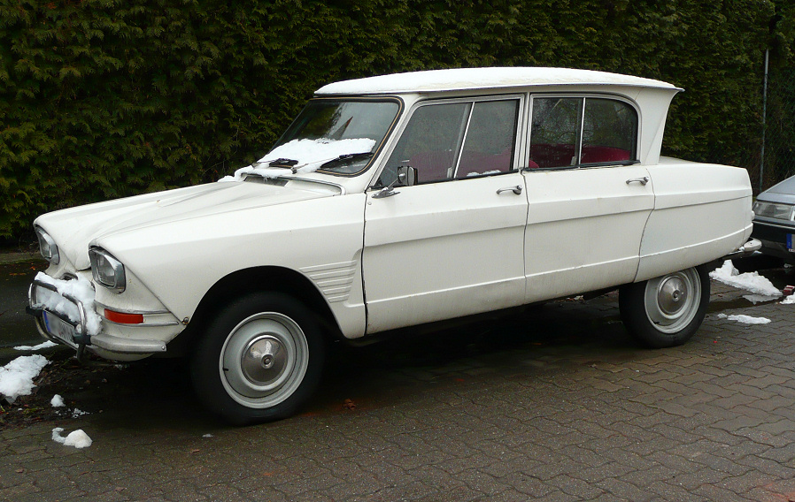 Citroën Ami